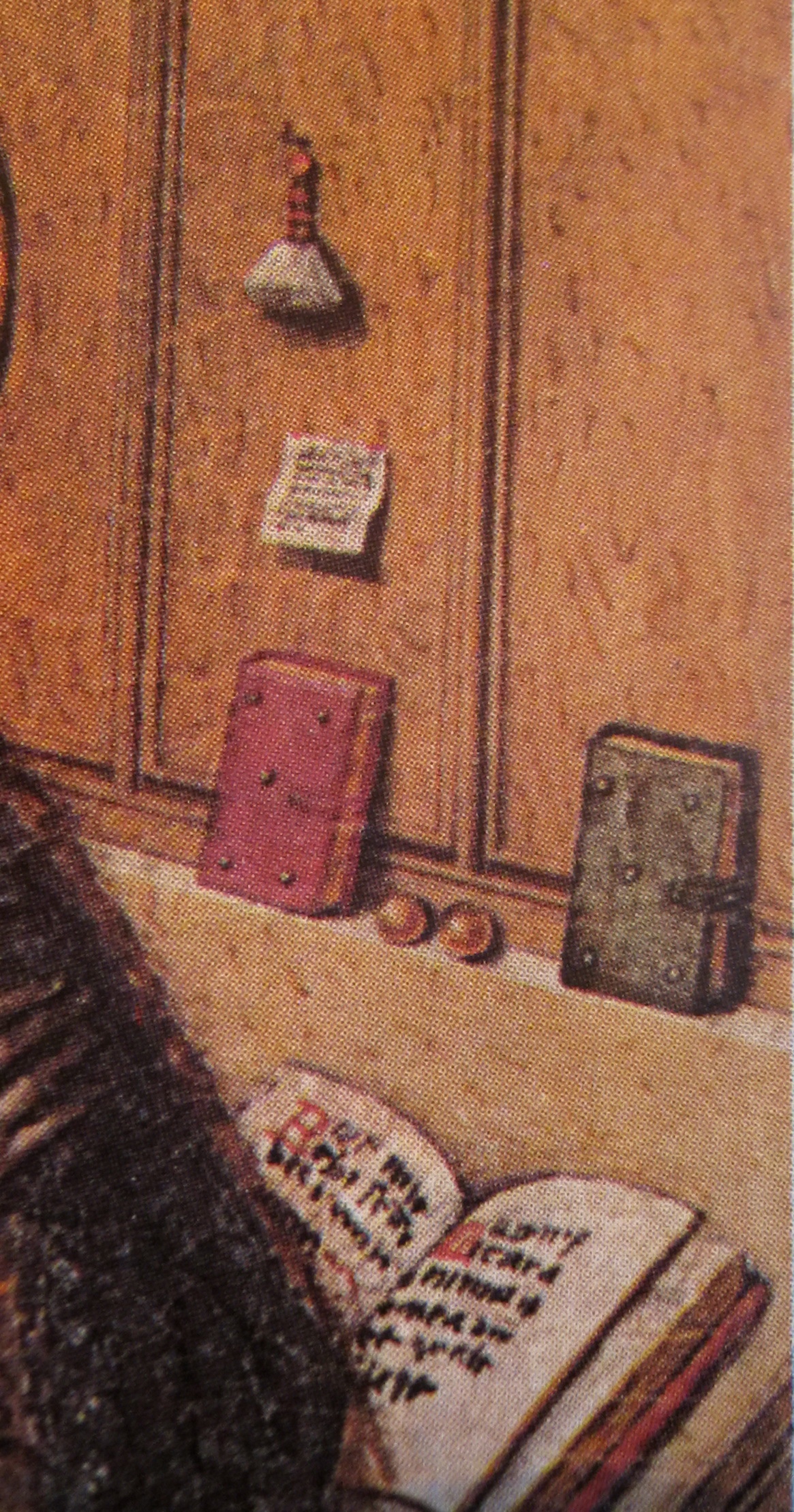 Detall dels llibres que llegeix Maria